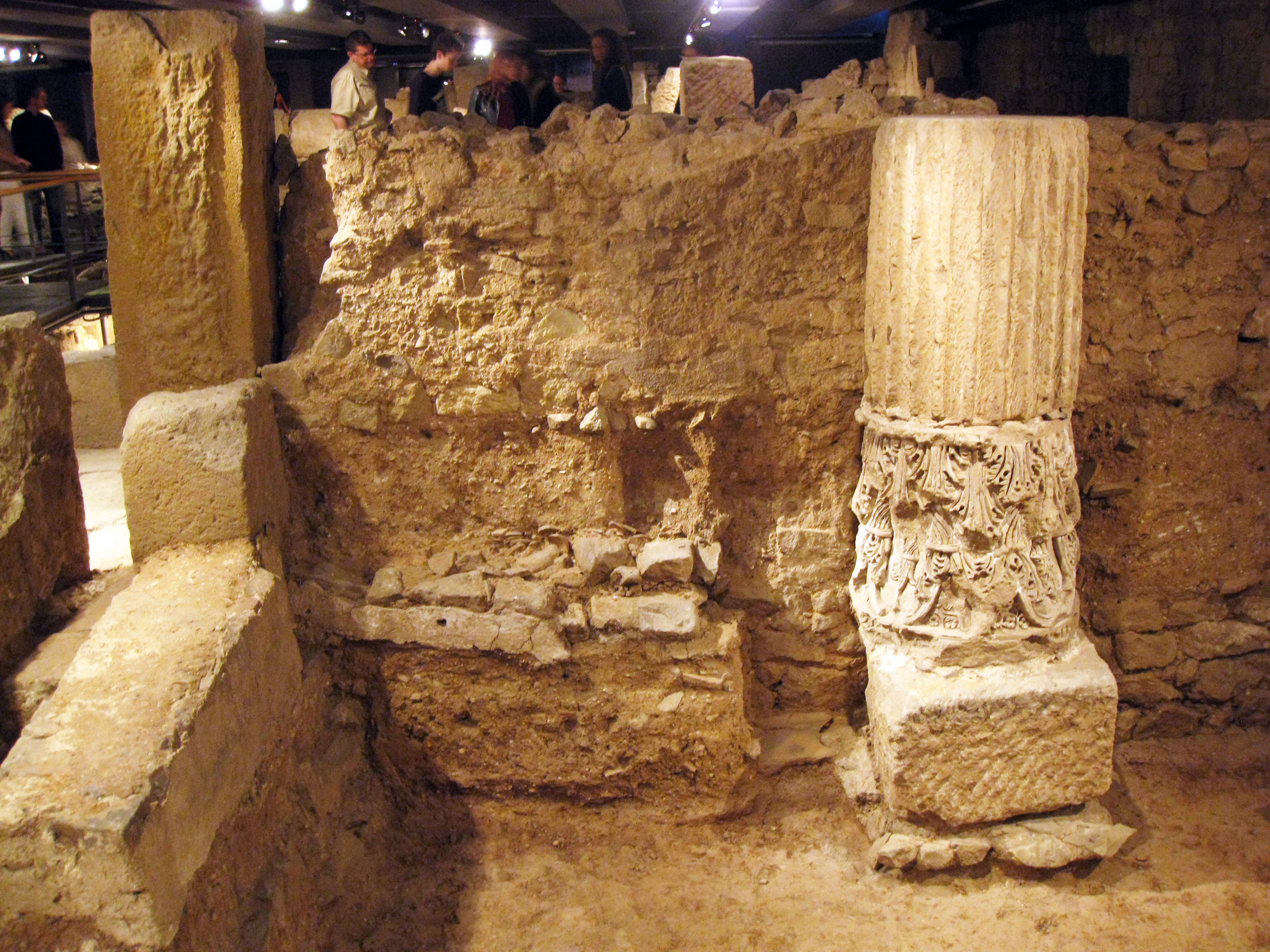 Museu_d'Història_de_la_Ciutat,_restes_de la basílica cristiana (Barcelona)